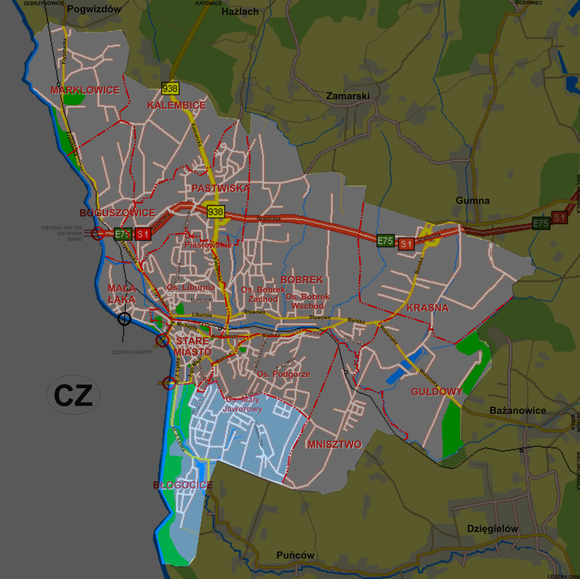 Błogocice - dzielnica Cieszyna